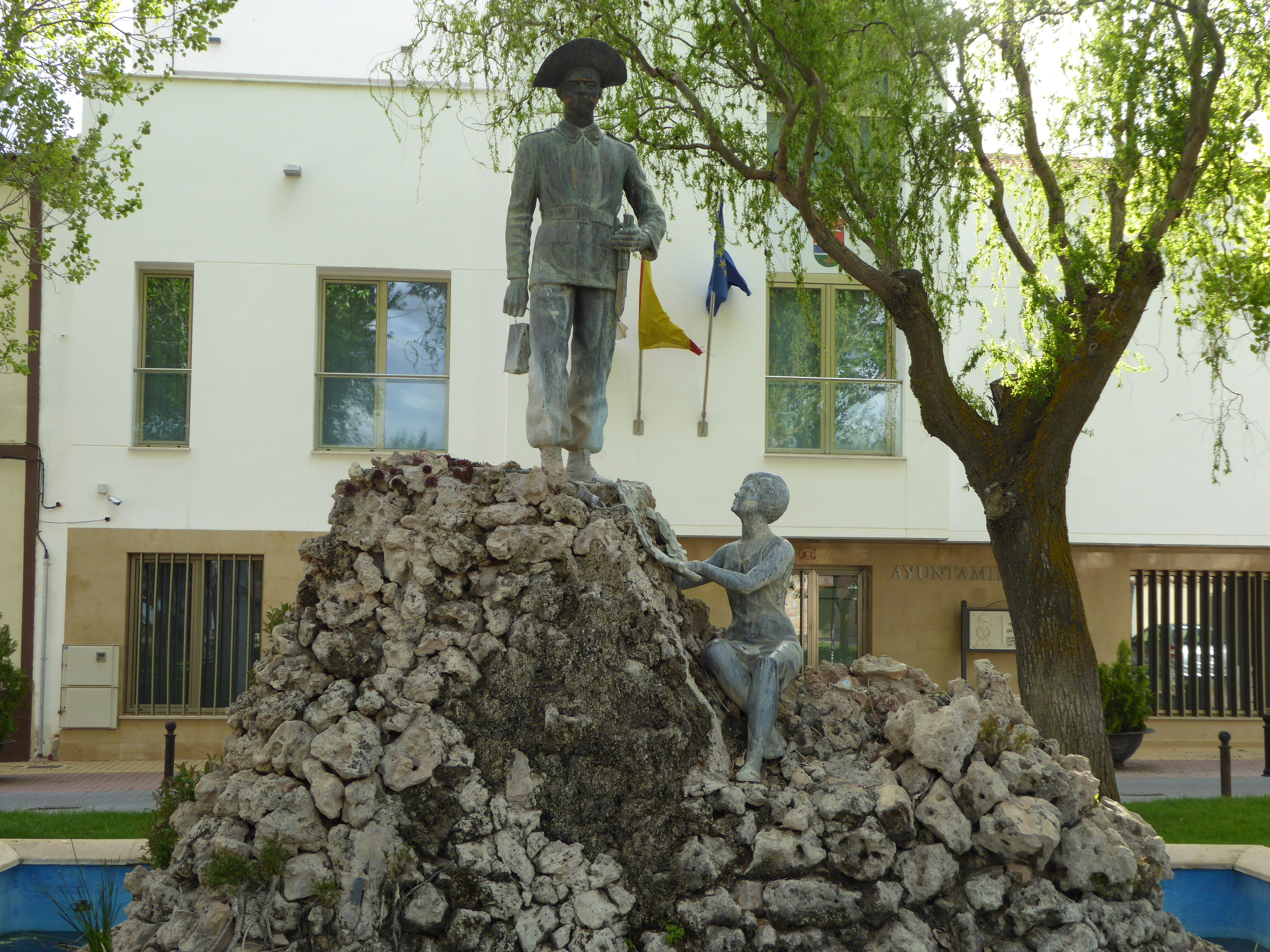 Osa de la Vega